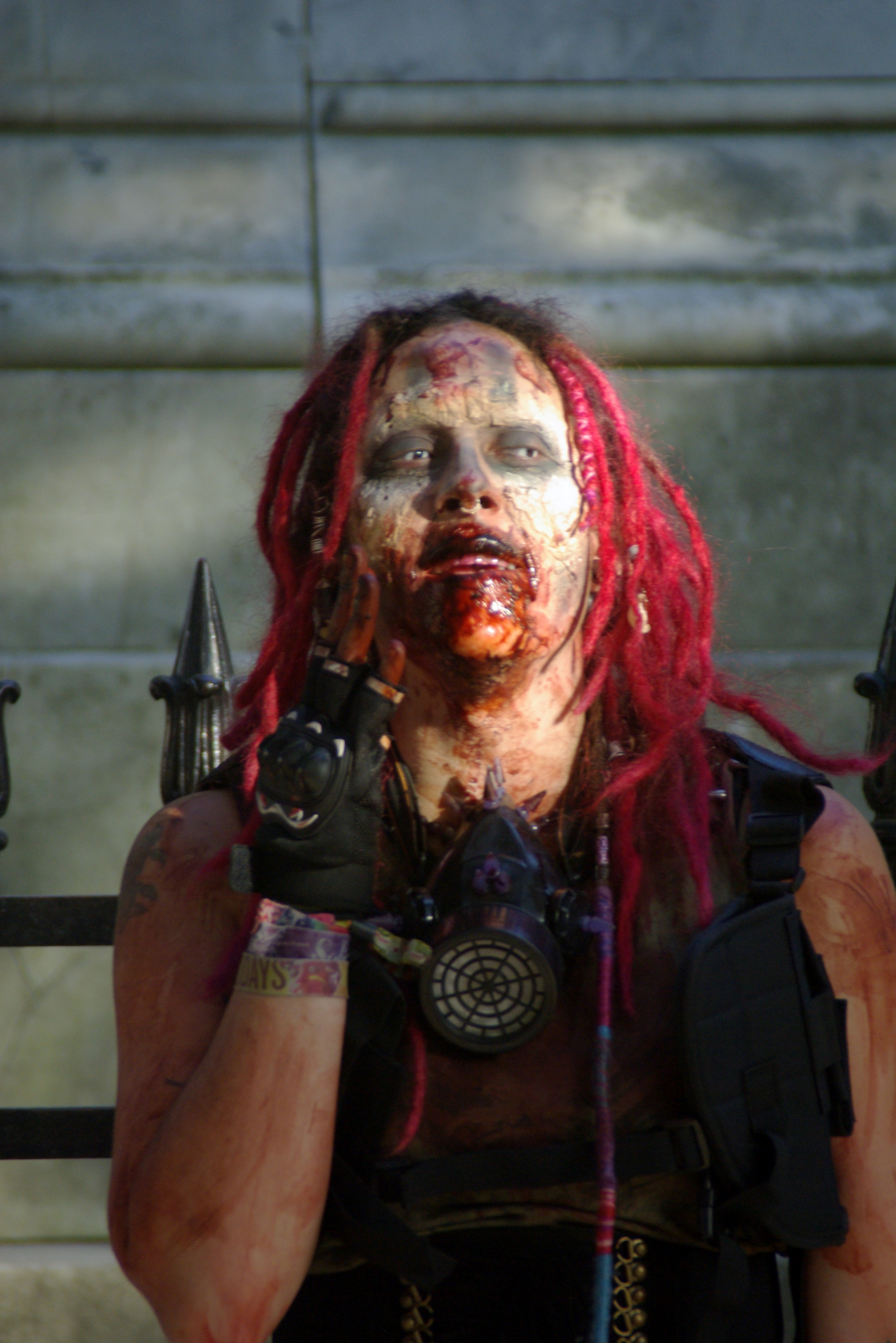 Zombies en la Plaza de los Vosgos, Les Marais, París